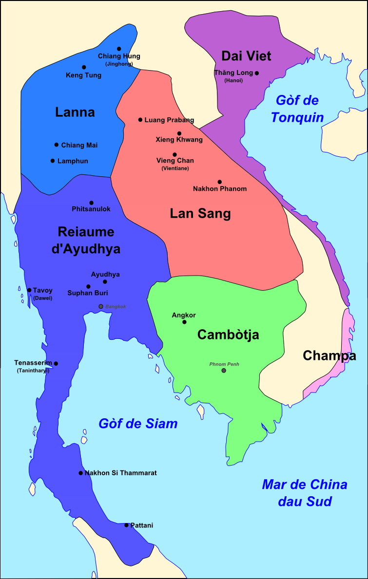 Division territòriala d'Indochina vèrs 1540.